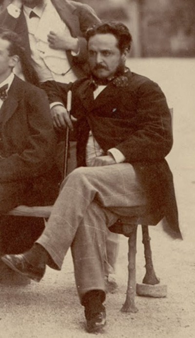 Bartomeu Puig i de Galup (Sitges, 1828 - Barcelona, 1884) metge i taxidermista català